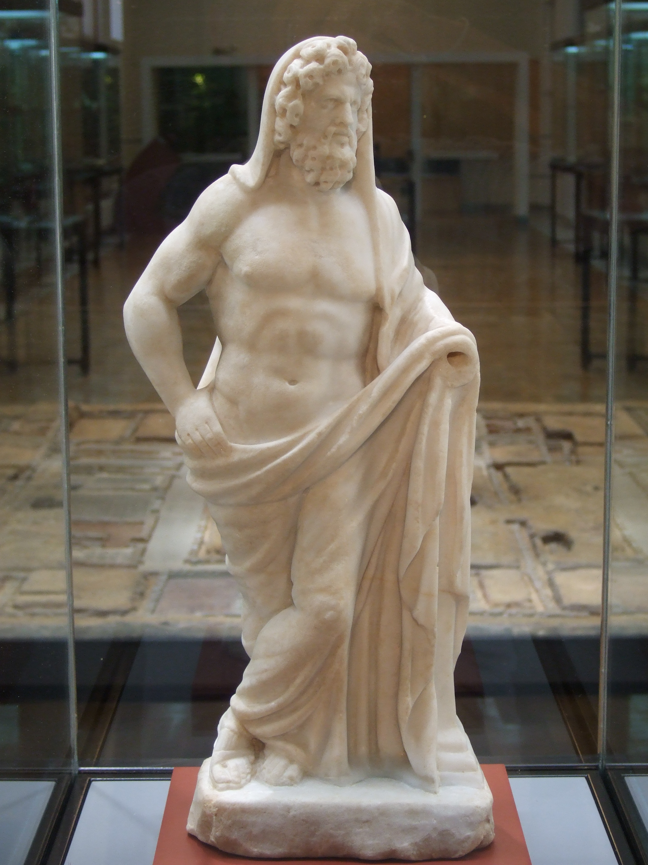 Saturno; Rioseco de Soria